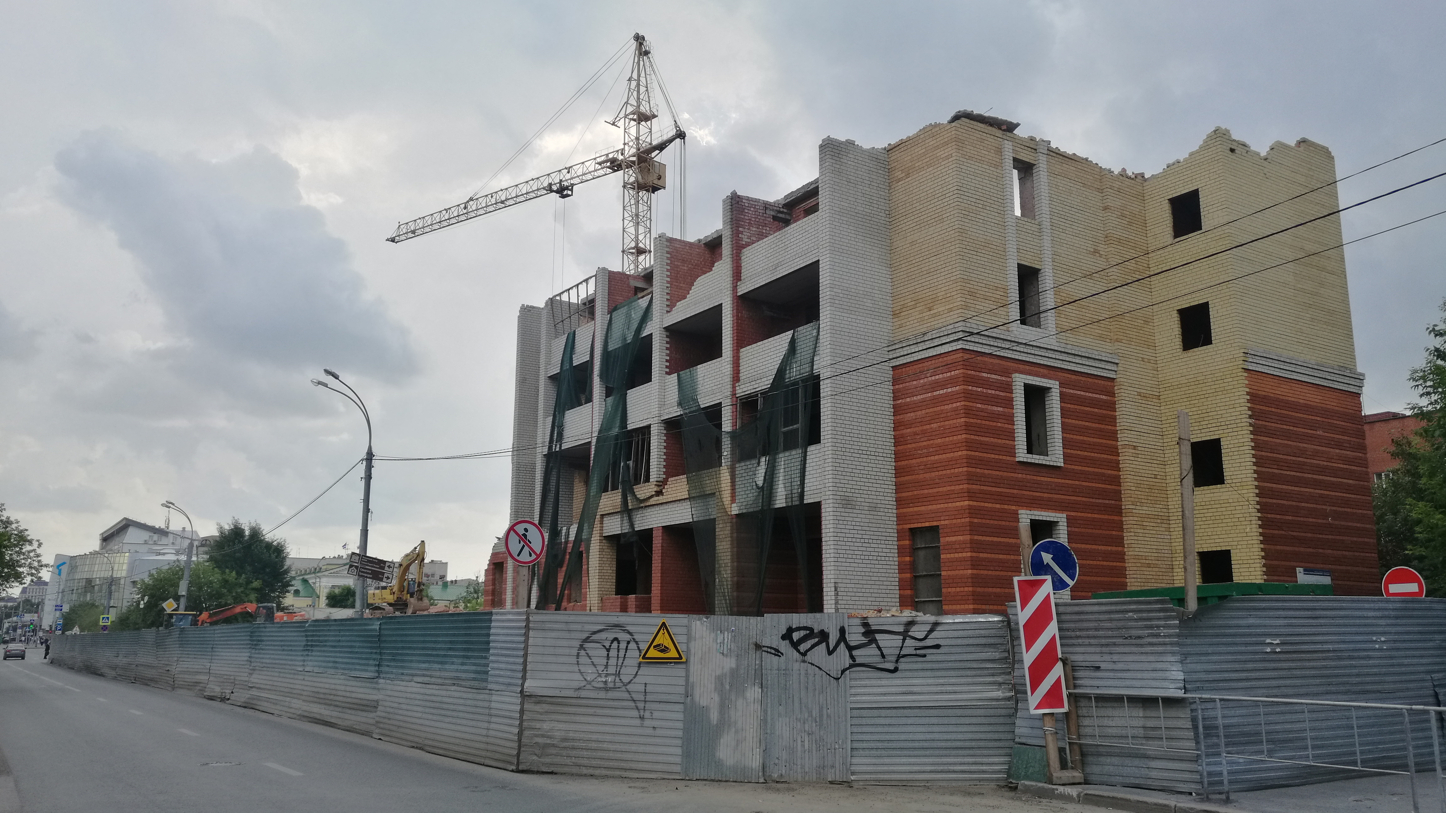 Ruinoj de la domo N 32-1 en strato Lenin. Tjumeno, Rusio.